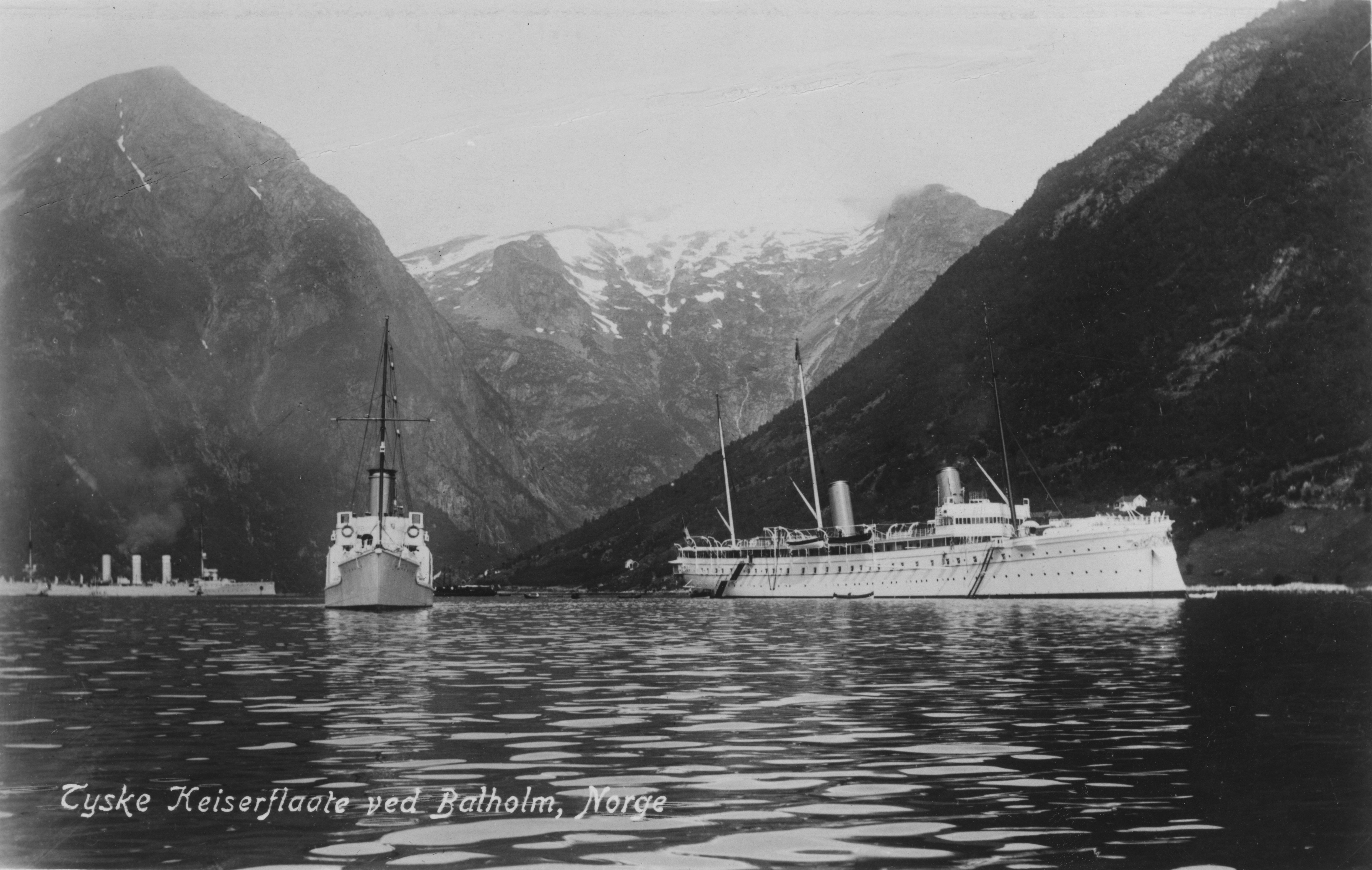 Bildet er hentet fra Nasjonalbibliotekets bildesamling